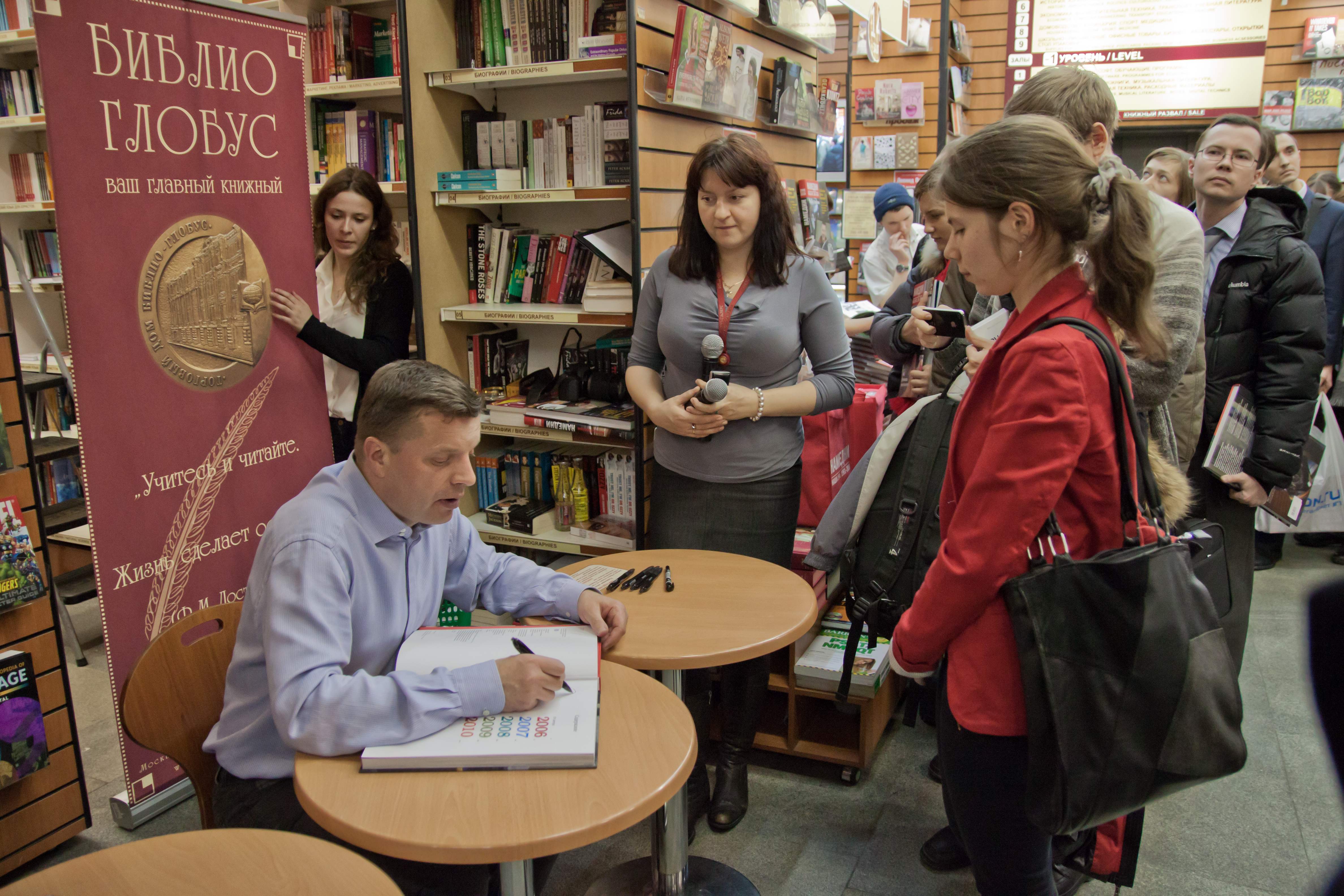 Леонид Парфёнов. Презентация книги "Намедни. Наша эра. 2006-2010" в магазине Библио-Глобус